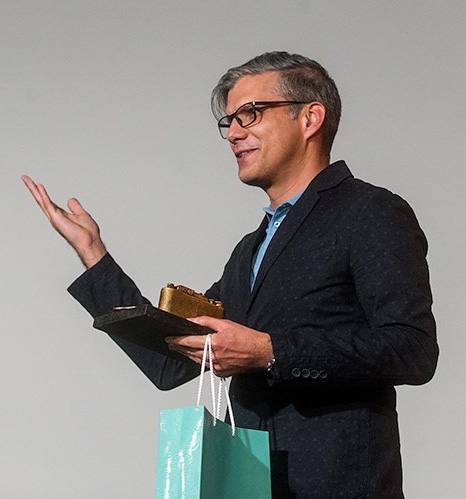 جاوید نیکپور در دومین دوره اهدای نشان عکس مطبوعاتی سال